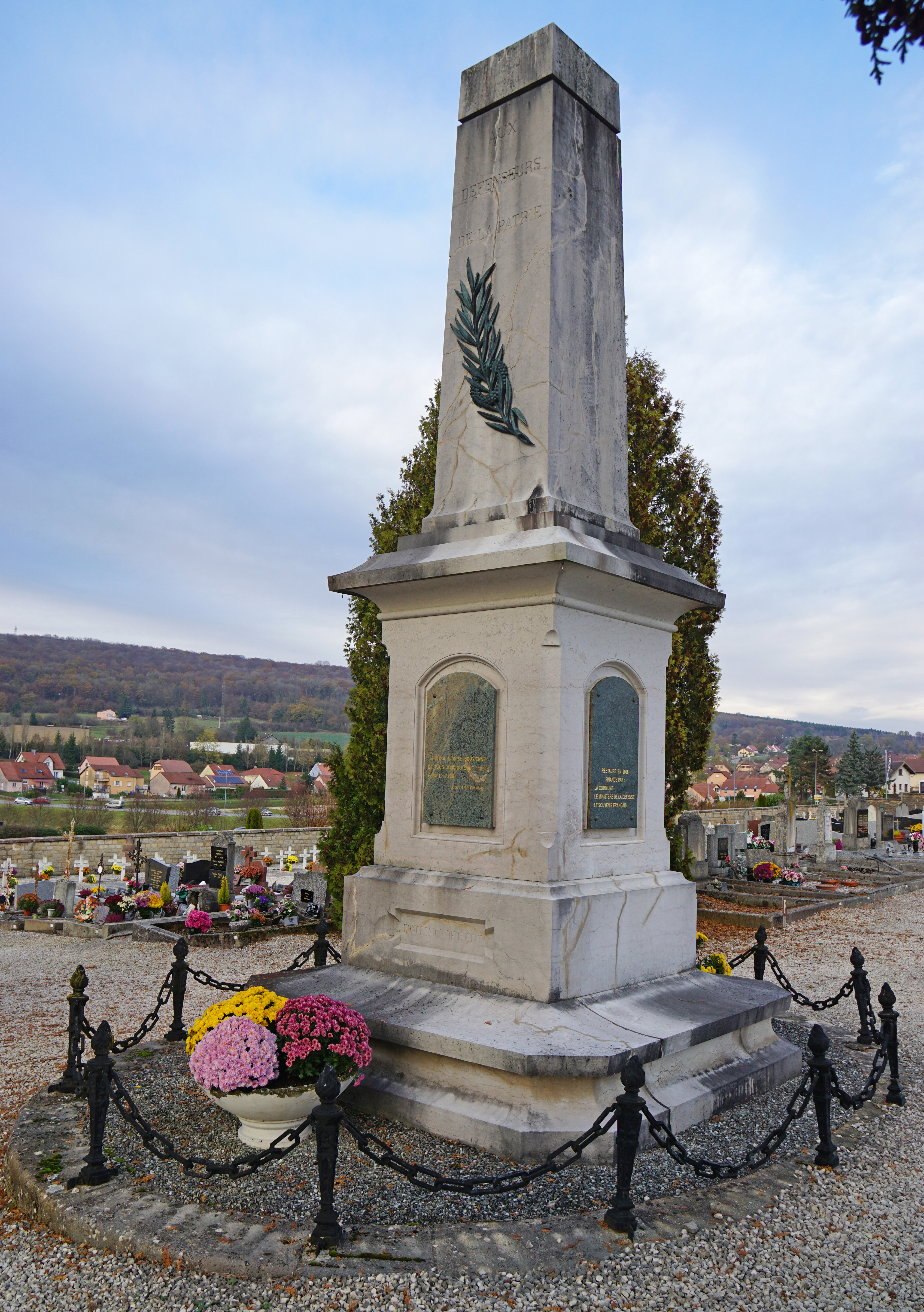 Le monument aux morts de la guerre de 1870 à Héricourt en Haute-Saône.